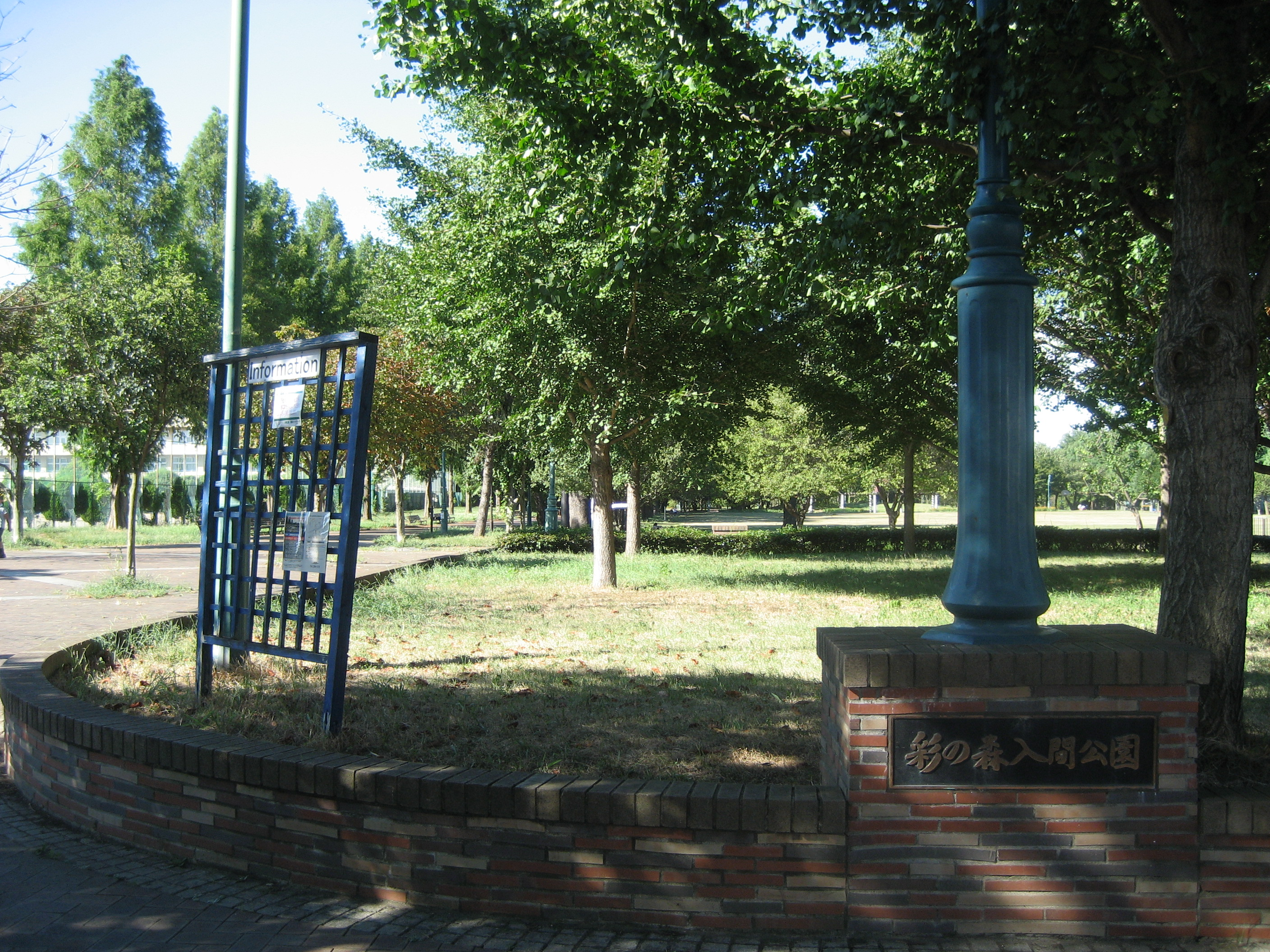 彩の森入間公園